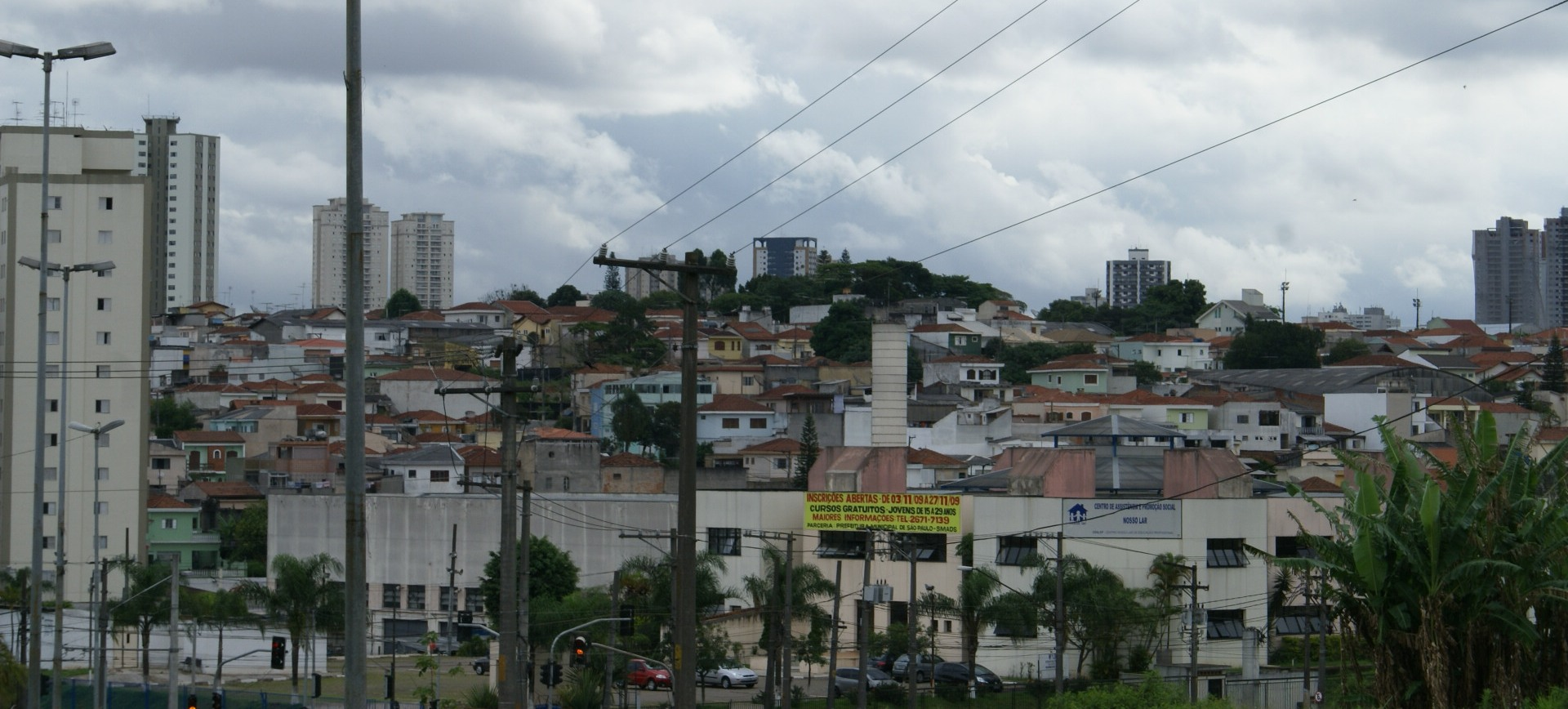 Vila Regente Feijó neighborhoods, in East Zone of São Paulo City. - Vila Regente Feijó, na Zona Leste de São Paulo.